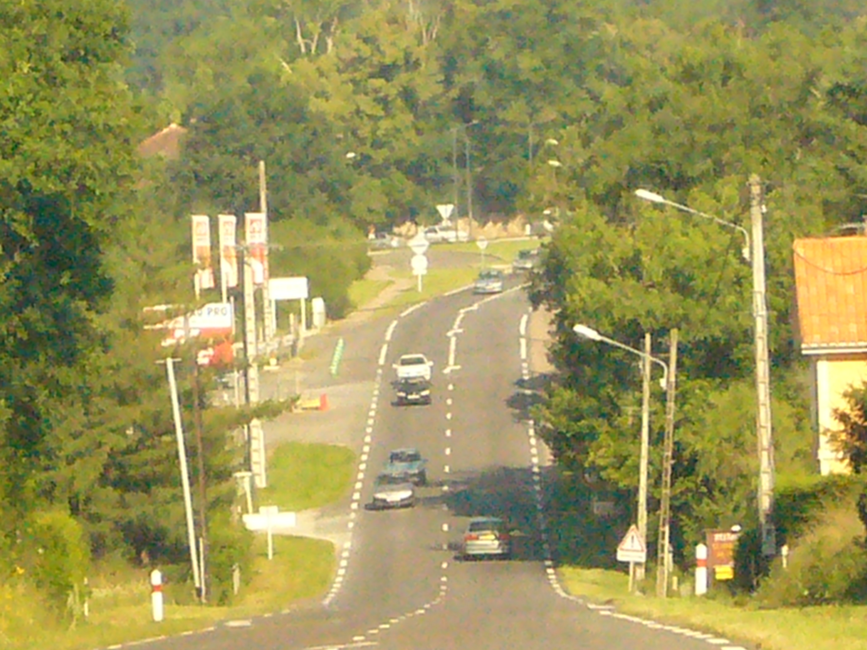 Route nationale 141 à Chabanais, Charente, France